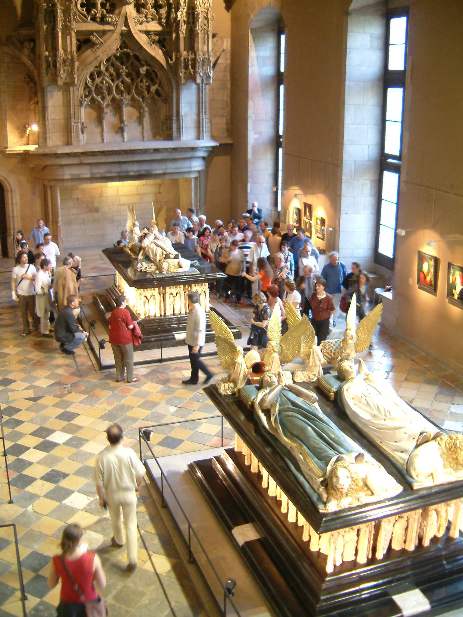 Tombeaux des Ducs de Bourgogne Jean sans Peur et Philippe le Hardi. Salle des gardes, Musée des Beaux-Arts de Dijon, Dijon, Bourgogne, FRANCE.